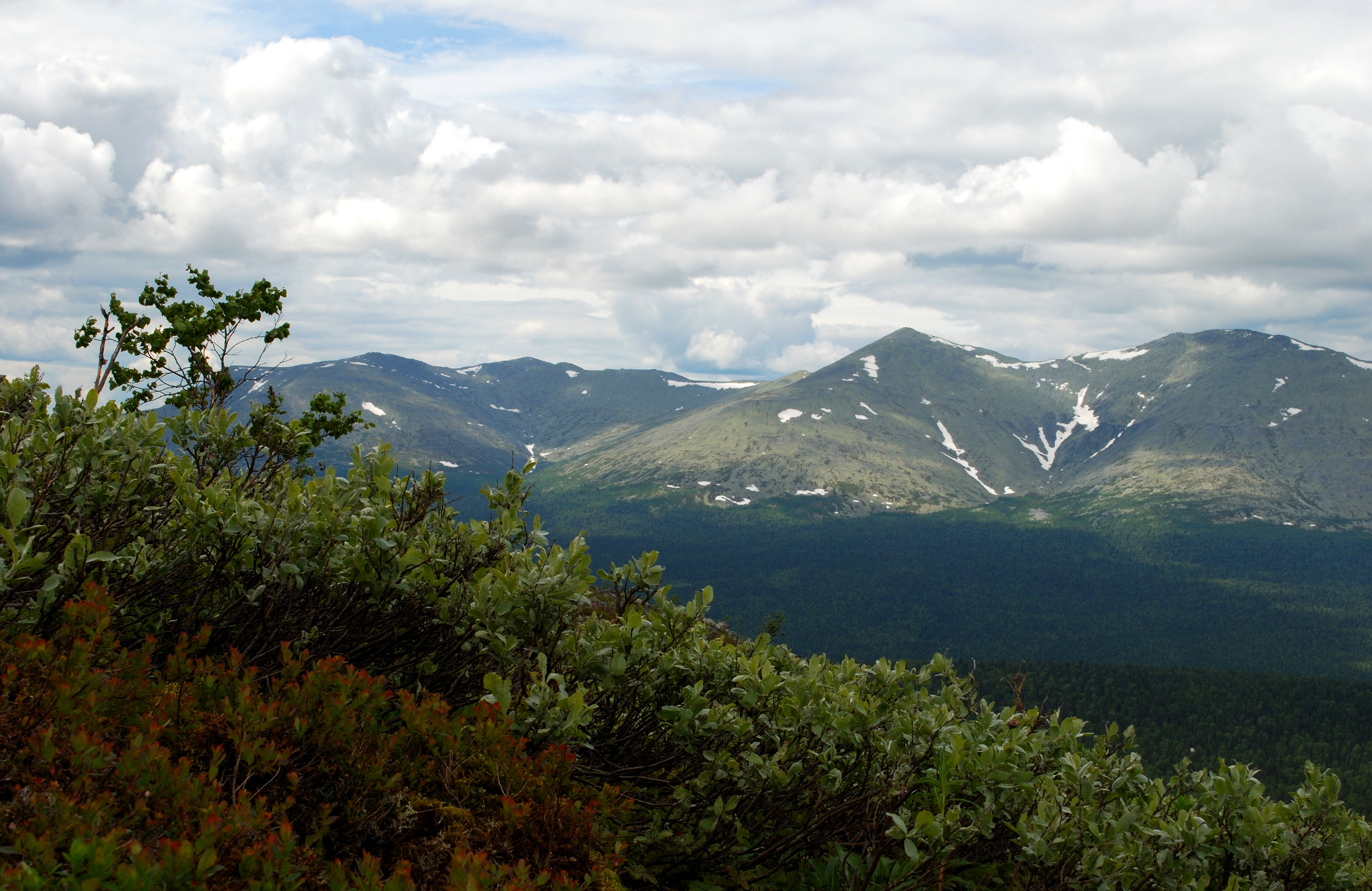 Вишерский заповедник, Красновишерский район This image is related to the protected area of Russia number 5900186